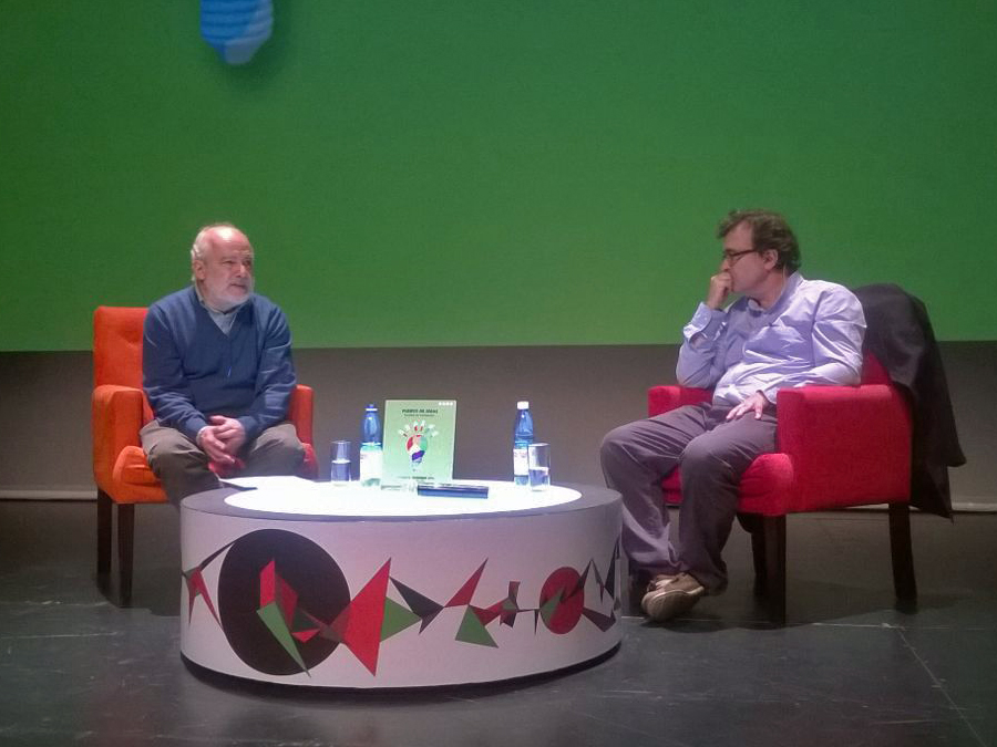 El escritor español Javier Cercas (derecha) y el crítico literario chileno Rodrigo Pinto (izquierda), durante la entrevista realizada al primero y titulada "La historia, la crónica, la novela". Evento: "Puerto de Ideas". Festival de Valparaíso Lugar: Teatro del Parque Cultural de Valparaíso Fecha: 13 de noviembre de 2016